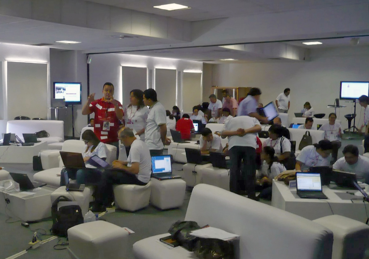 Kleingruppen-Workshops während des Edu Camps am 9. Dezember 2008 in Bucaramanga in Kolumbien, das im Rahmen der EduCamps Colombia 2008 stattfand.